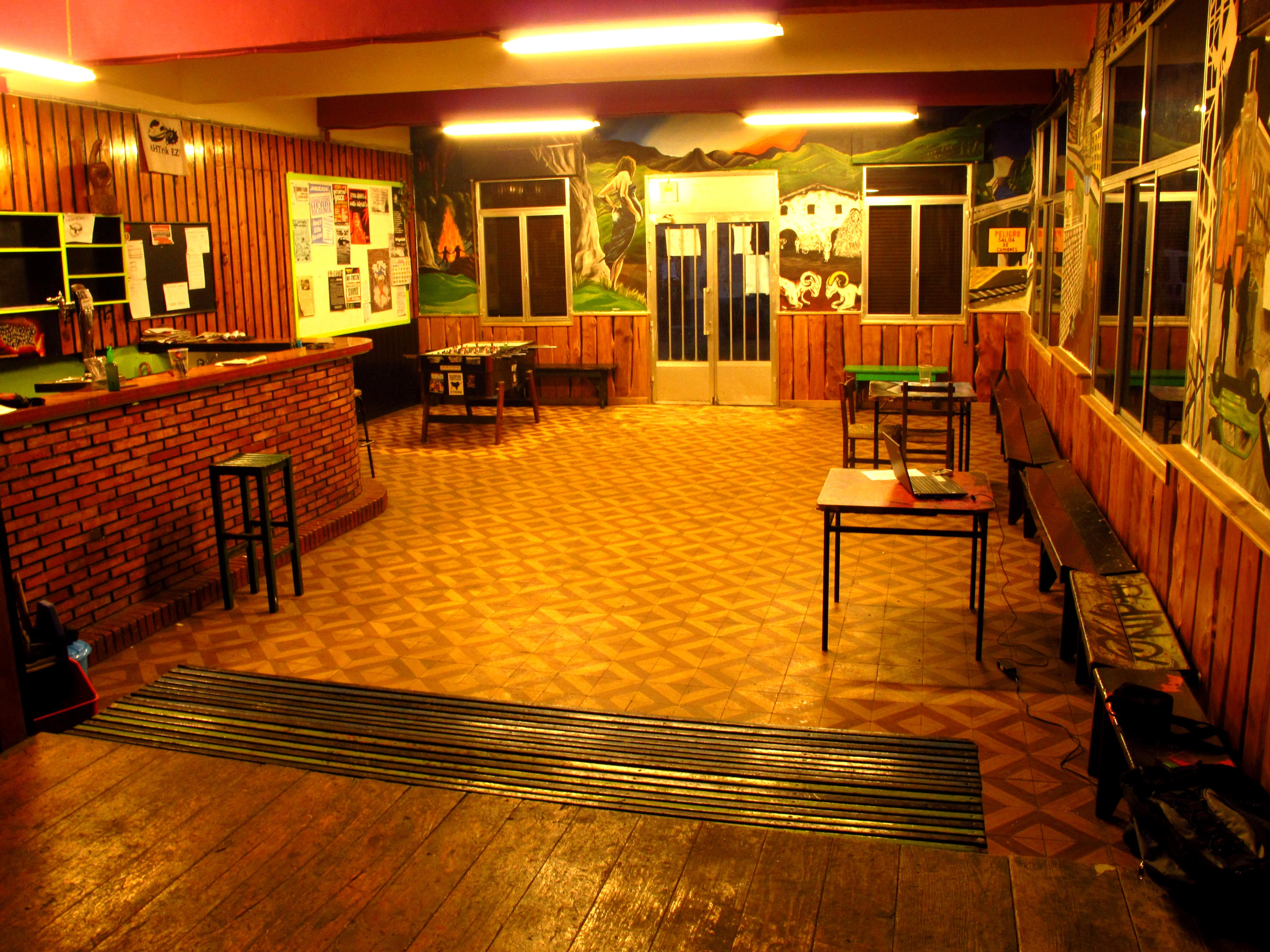 Soraluzeko gaztetxearen barnealdeko argazkia.